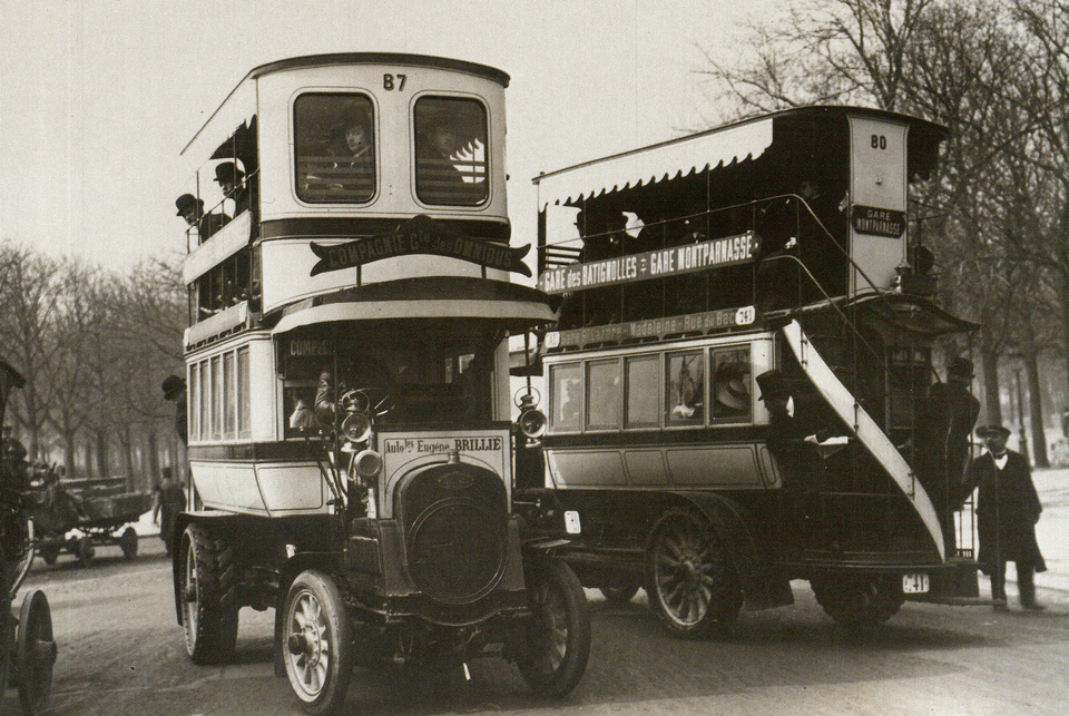 Bus Brillié P2 à Paris, après 1905, cartes postales